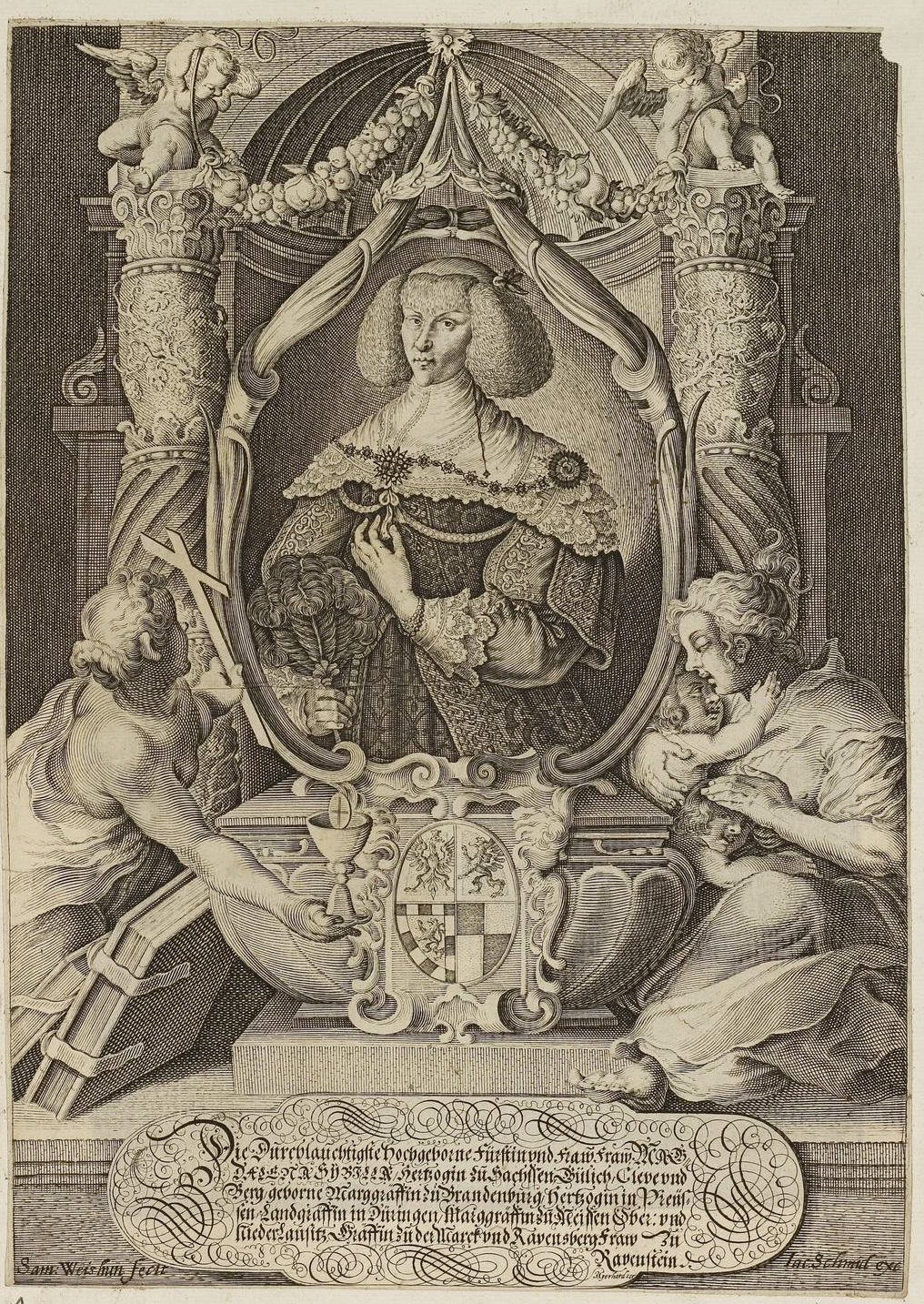 Grafik aus dem Klebeband Nr. 1 der Fürstlich Waldeckschen Hofbibliothek Arolsen Motiv: Magdalena Sibylla, Herzogin von Sachsen, geb. Markgräfin von Brandenburg (= Magdalena Sibylla, Prinzessin von Brandenburg-Preußen 1587-1659, verheiratet mit Kurfürst Johann Georg von Sachsen)